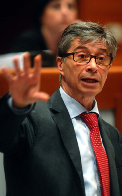 Vasco Errani alla presentazione in Assemblea legislativa della Regione Emilia-Romagna del Programma di governo 2010-2015